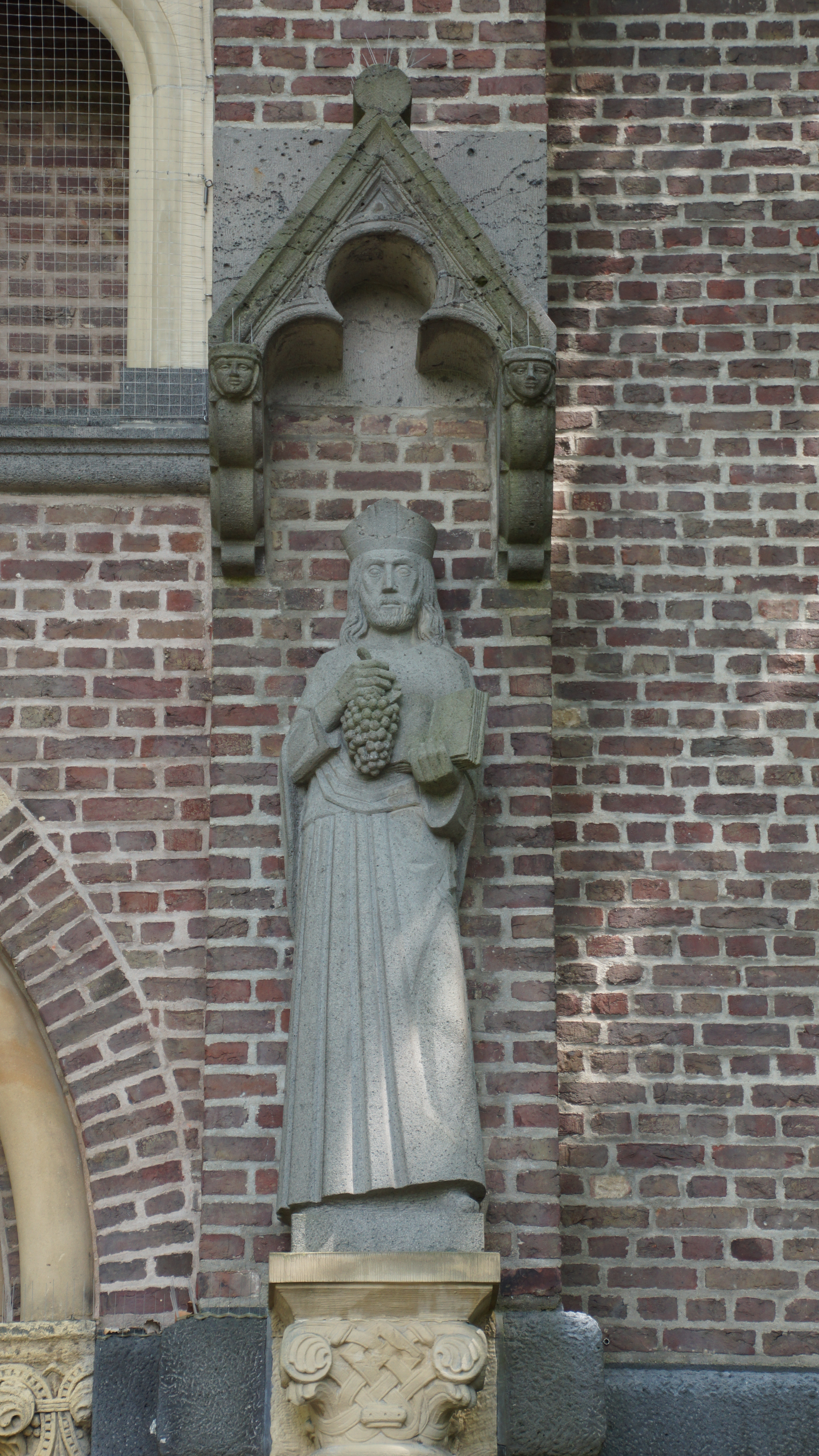 Skulptur des heiligen Audomar mit Weintrauben und Buch am Portal von St. Audomar Frechen, 1983 von Olaf Höhnen erstellt.